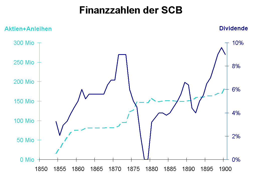 Aktienkapital und feste Anleihen sowie Dividende Aktien sind Anteile am Grundkapital des als Aktiengesellschaft konstituierten Bahnunternehmens. Sie sind hier im Nennwert angegeben, der jedoch in keiner Weise dem Kurswert entsprechen muss. Viele Bahnen haben im Laufe der Zeit ihr Aktienkapital erhöht, was gewöhnlich auf eine Expansion der Bahn hindeutet. Eine Verminderung des Aktienkapitals wurde bei finanziellen Schwierigkeiten vorgenommen, indem durch Herabsetzung des Nennwerts der Aktien Kapital für das Unternehmen freigesetzt wurde (sogenannter Kapitalschnitt). Feste Anleihen waren neben Aktien die wichtigste Form der Geldbeschaffung für die Bahnen. Das vom Unternehmen aufgenommene Kapital wird über eine bestimmte Laufzeit zu einem bestimmten Zinssatz verzinst. Die Zinslast für Anleihen war ein gewichtiger Ausgabeposten insbesondere der grossen Bahnen. Wenn wegen zu geringen Erträgen die Zinsen nicht mehr bezahlt werden können, droht der Konkurs. Die Dividendenauszahlungen für die Aktionäre sind hier im Verhältnis zum Nennwert der Aktien angegeben.